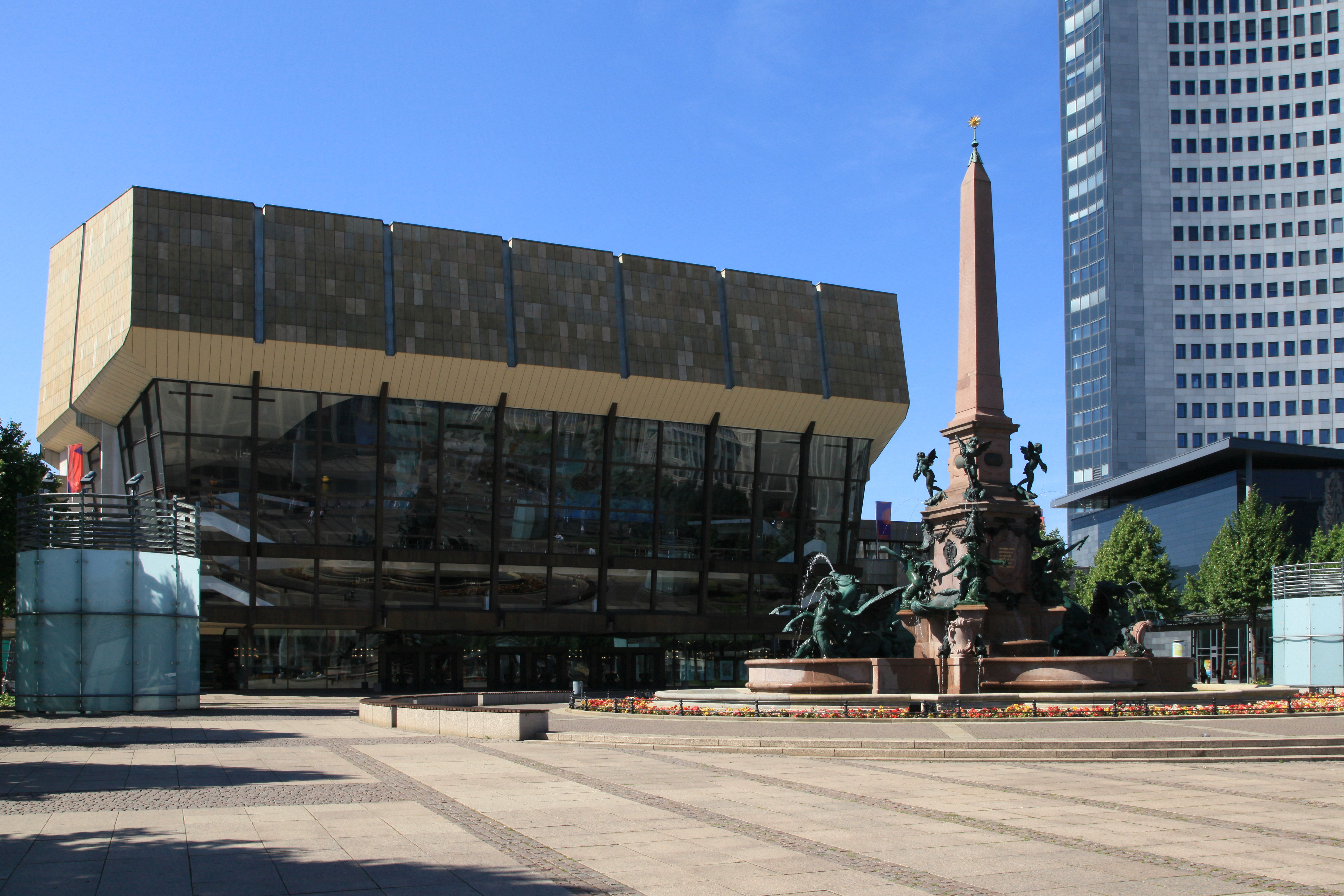 Neues Gewandhauses, Mendebrunnen und City-Hochhaus, Augustusplatz in Leipzig